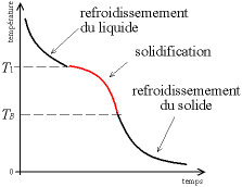 Evolution de la température lors du refroidissement d'un mélange binaire à solution solide unique. Auteur : Christophe Dang Ngoc Chan (Cdang), réalisé avec un programme de dessin vectoriel. Licence GFDL Christophe Dang Ngoc Chan